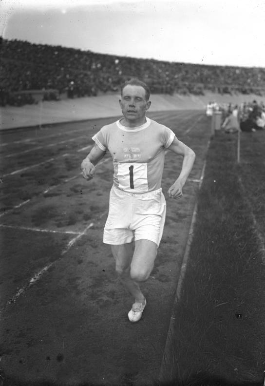 Der finnische Wunderläufer Nurmi vom Amateursport suspendiert ! Der berühmte finnische Meisterläufer Nurmi wurde vom Internationalen Leichtathletik-Verband in Berlin vom Amateursport suspendiert. Das Erscheinen Nurmis auf der Olympiade in Los Angeles ist dadurch in Frage gestellt.